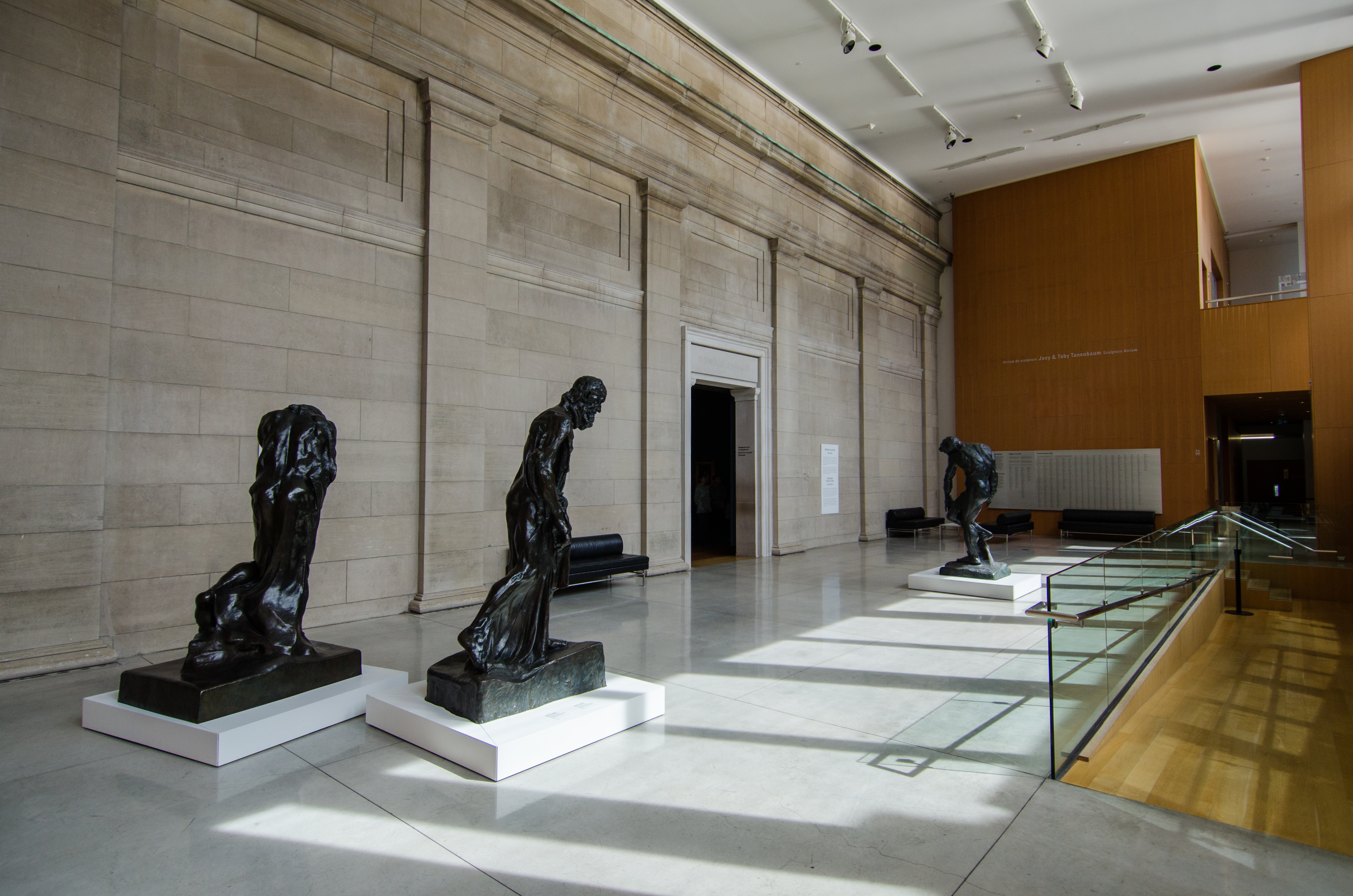 Seen in Hannibal #107 & Lost Girl #510.